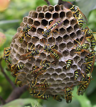 Nid de guêpe Photo issue de ma banque d'images personnelle : Pep.per 19 mars 2006 à 22:41 (CET)